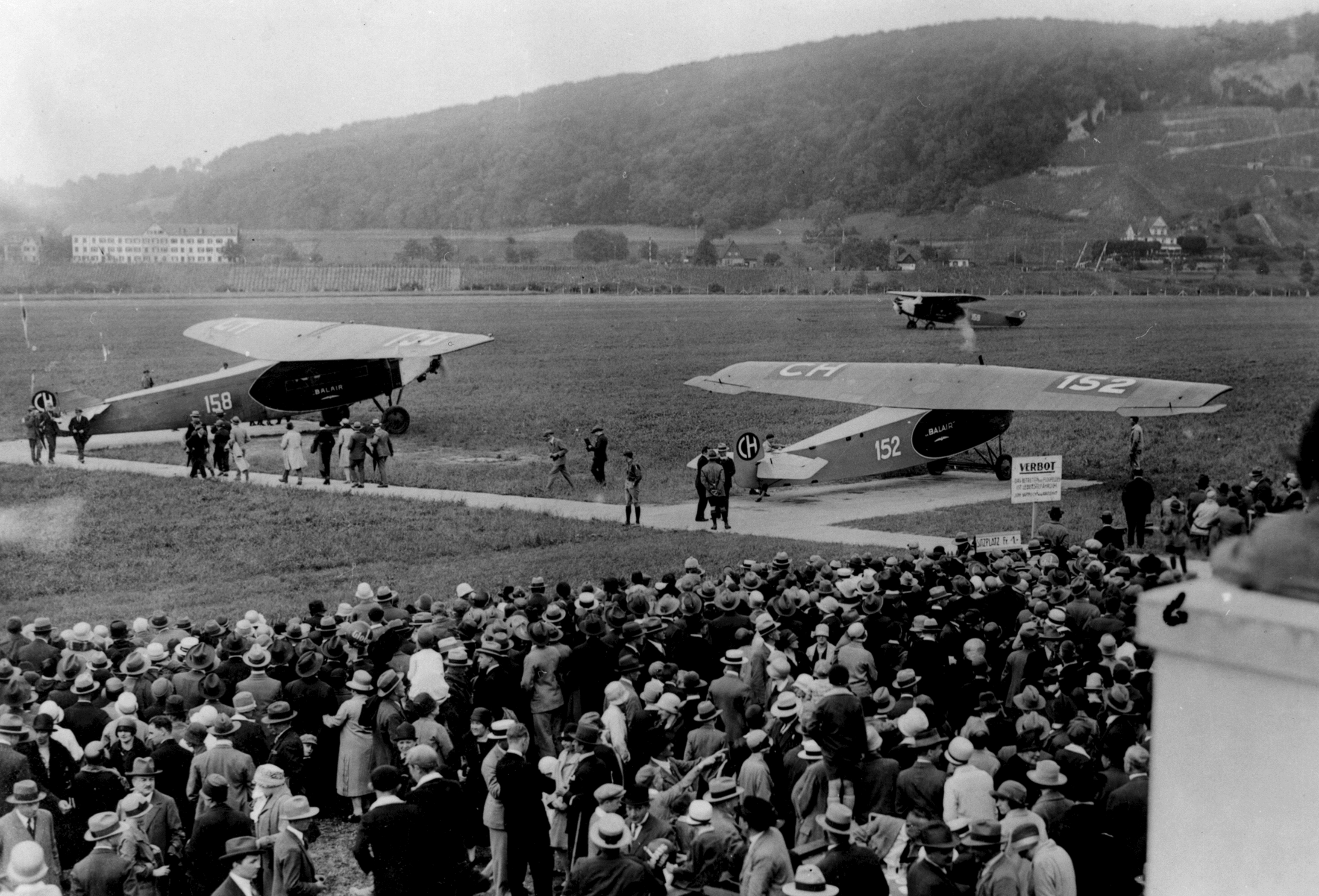 Basel Birsfelden, CH-152 Fokker F-III, CH-158 Fokker F-VIIa und CH-159 Fokker F-VIIa am Boden, Passagierflugzeuge, Hochdecker, Fluplatz Sternenfeld, Passagiere, Menschenmenge